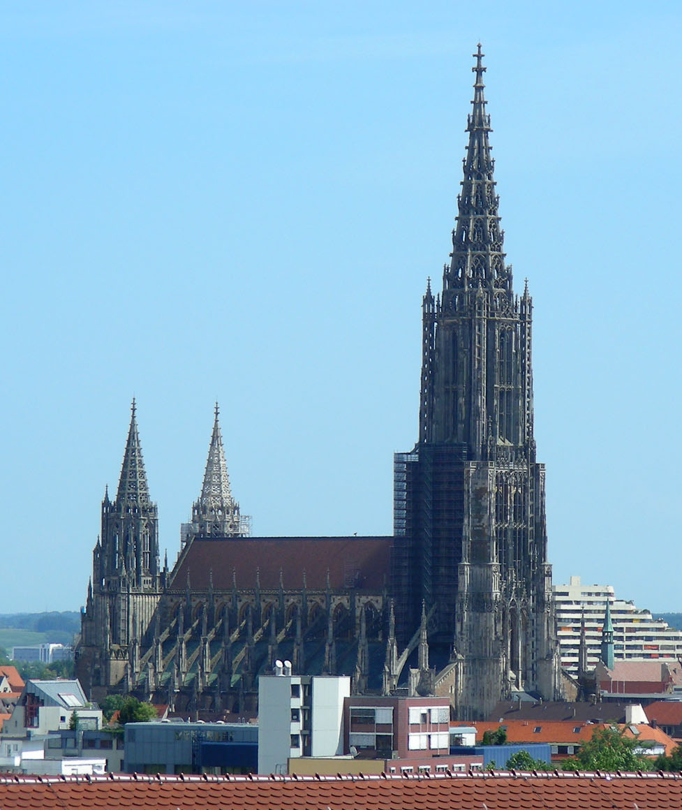 Ulmer Münster vom Kienlesberg aus gesehen